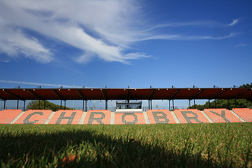 Stadion w Głogowie.